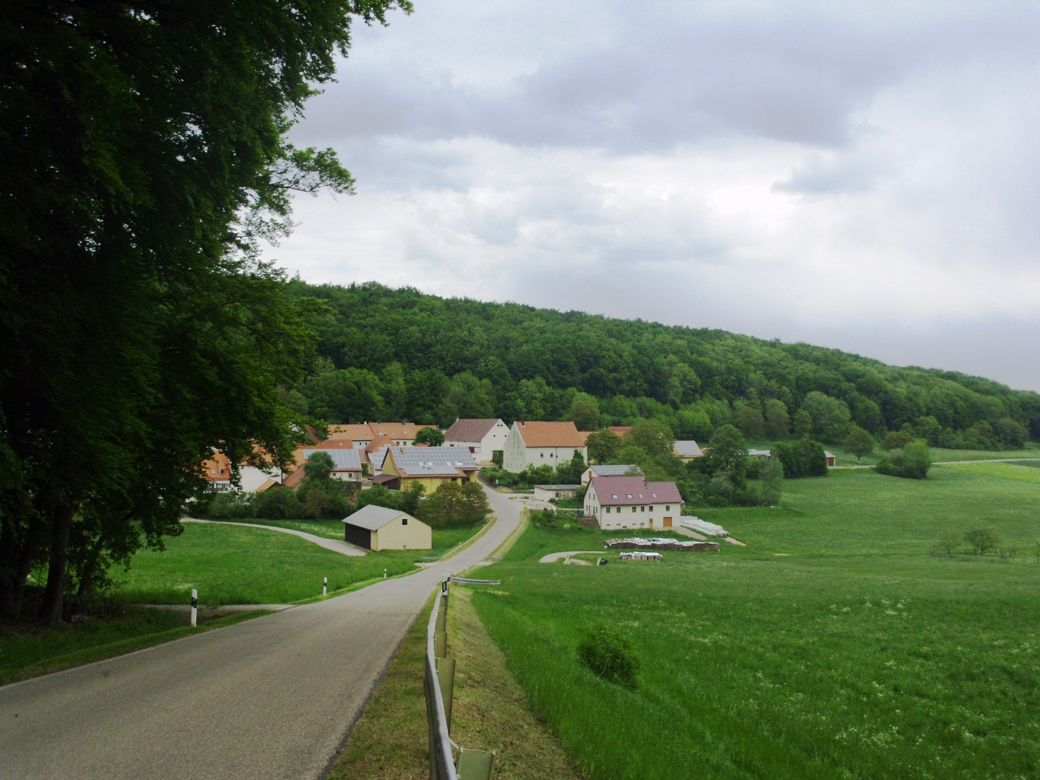 Falbenthal, Ortsteil der mittelfränkischen Stadt Treuchtlingen im Landkreis Weißenburg-Gunzenhausen (Bayern)